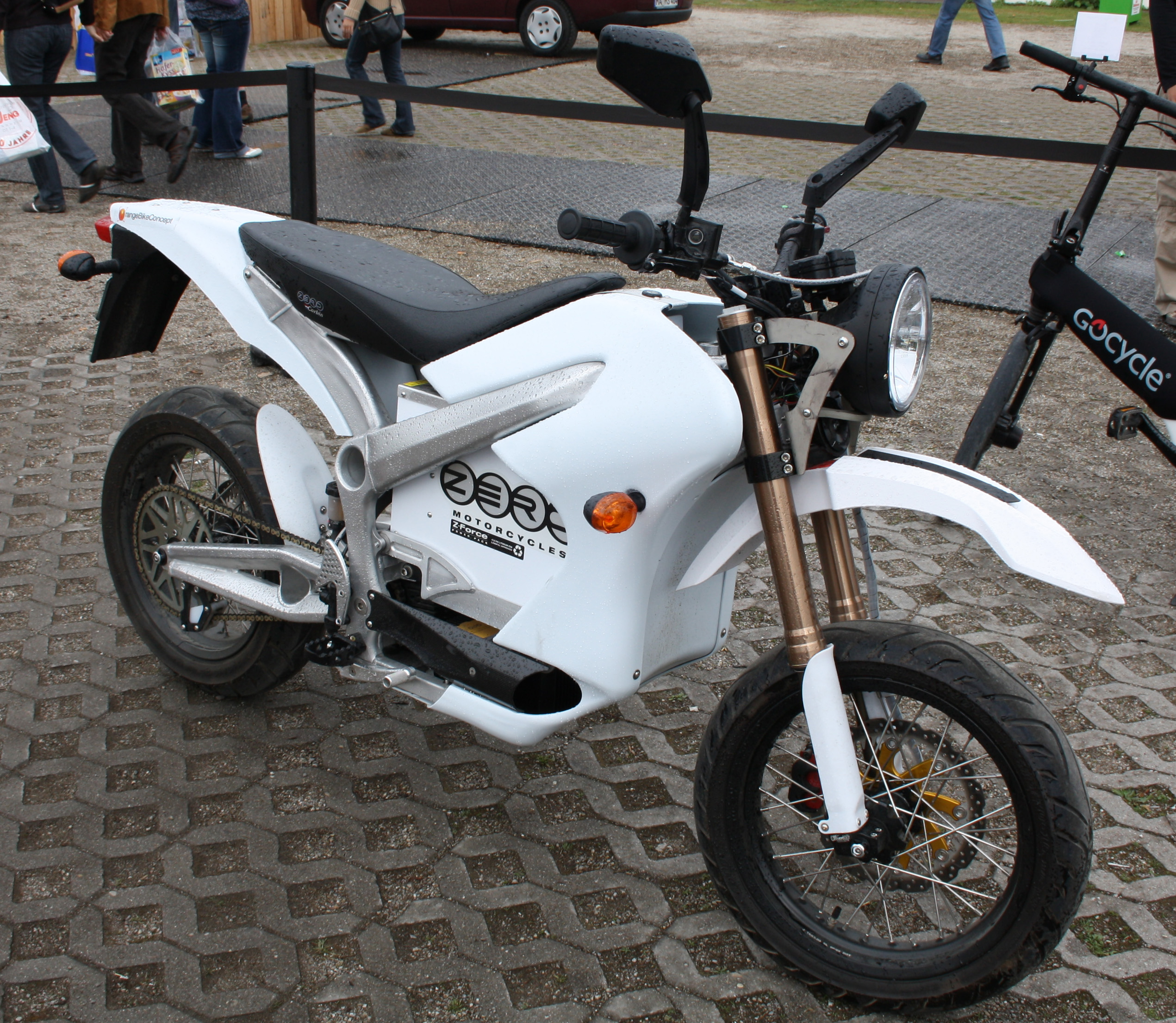 Elektromotorad von Zero Motorcycles. Aufgenommen am 2. Mai 2010 auf dem Maimarkt Mannheim, Stand Elektromobilität von RWE, Renault und Sixt.